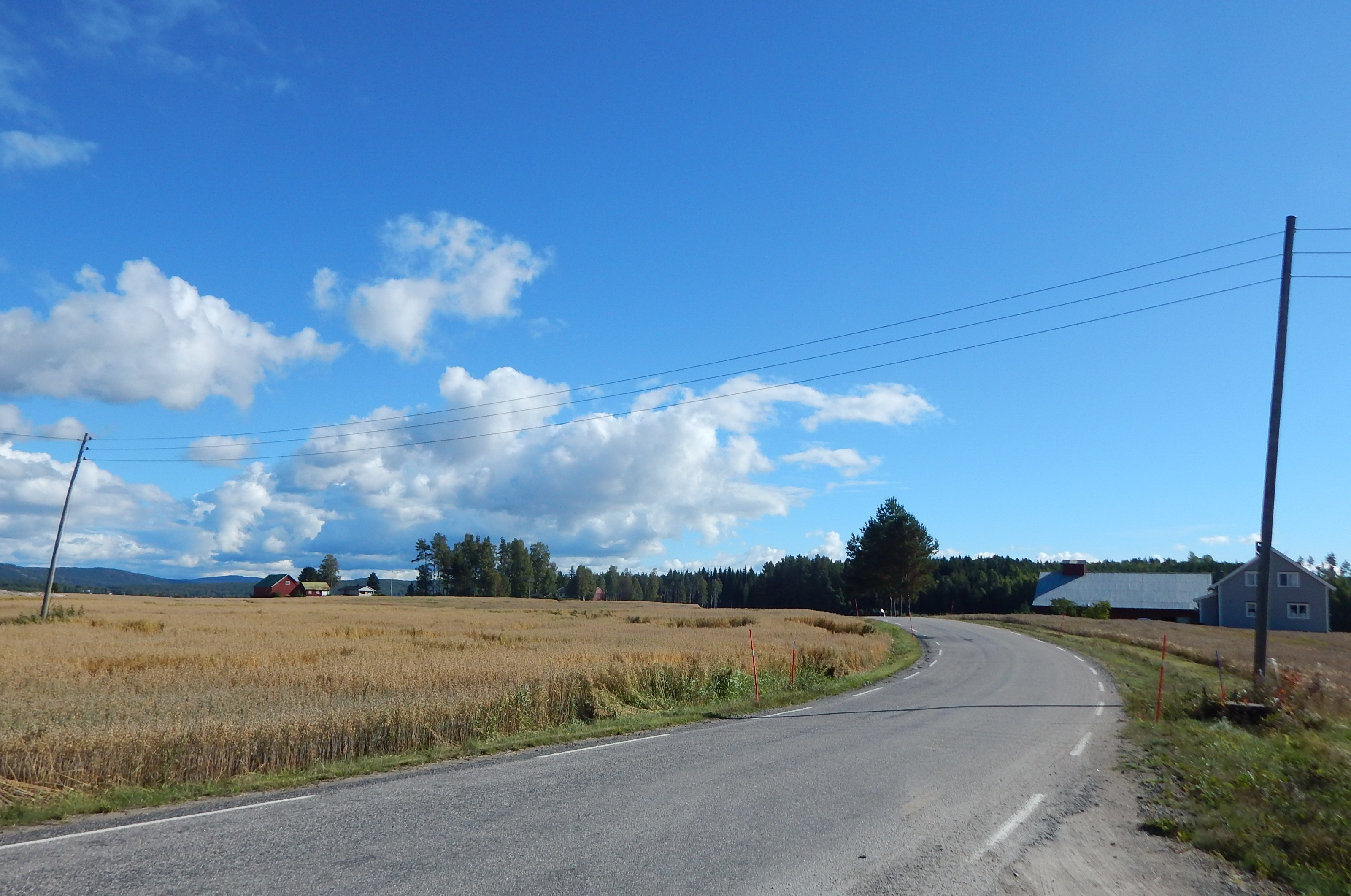 Vestre Gjesåsveg (fylkesvei 451)